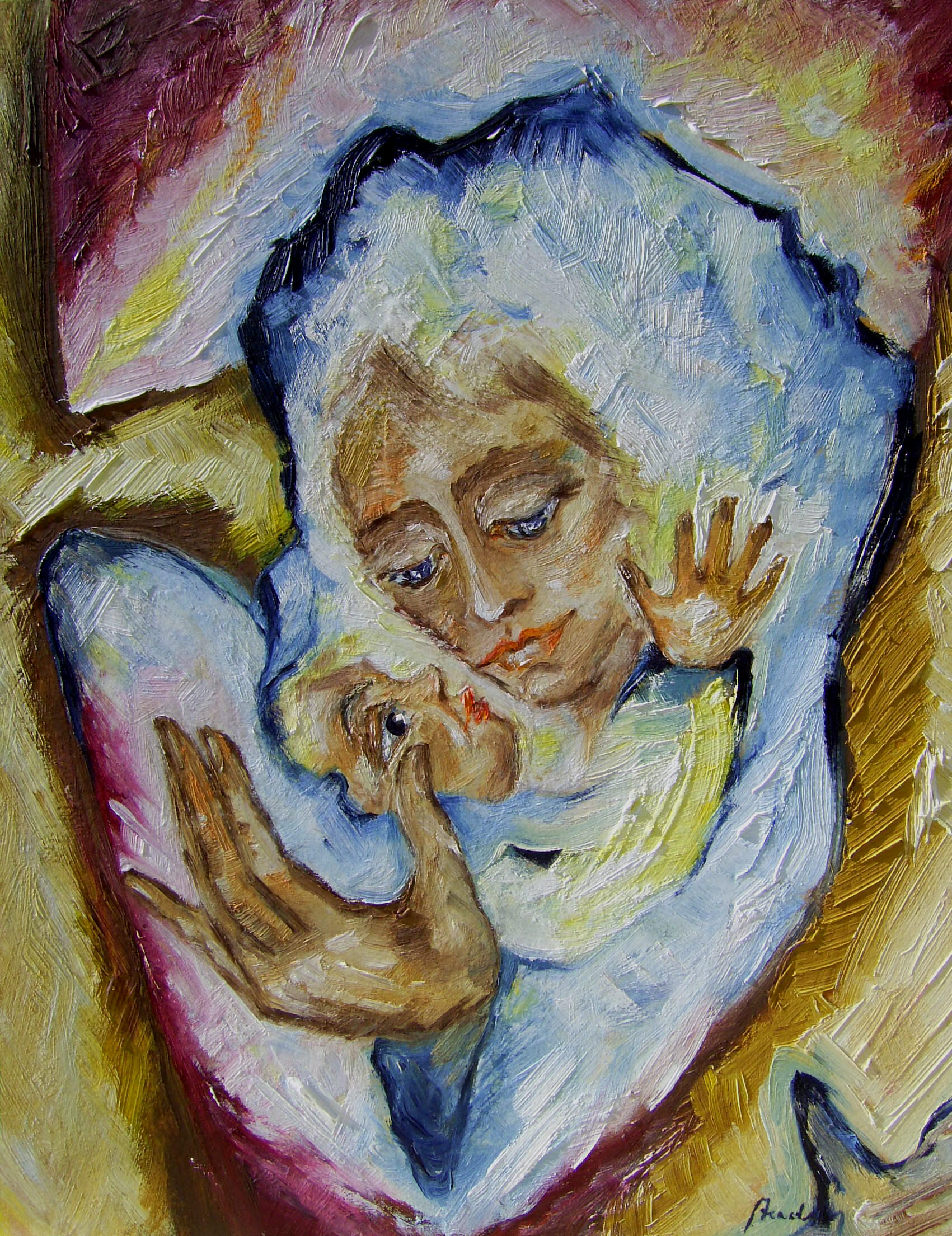 Dagmar Anders - "Maria mit dem Kinde", Ölgemälde